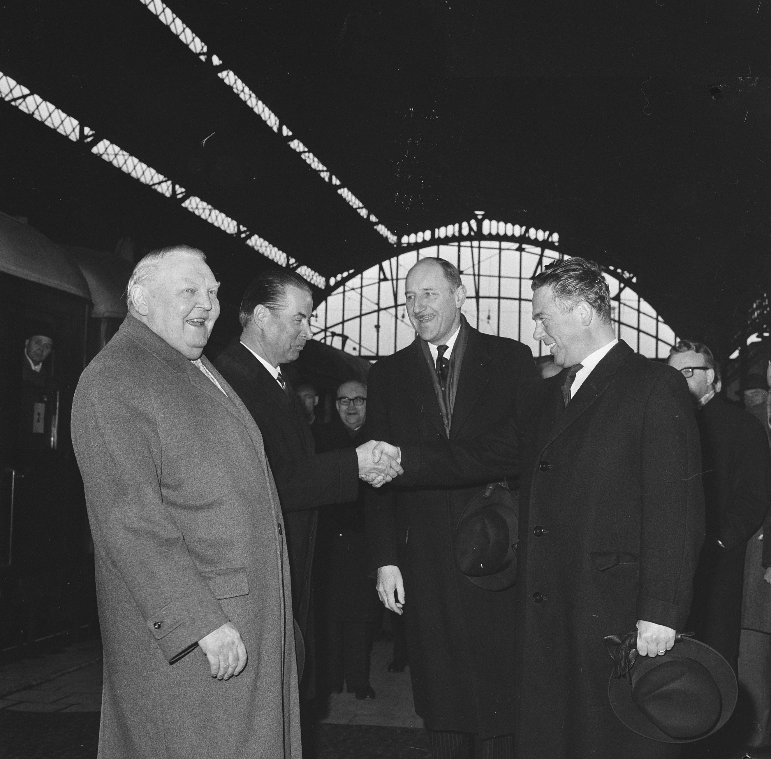 Bundeskanzler Ludwig Erhard in den Niederlanden, Empfang am Bahnhof in Den Haag. V.l.n.r.: Ludwig Erhard, Gerhard Schröder, Joseph Luns und Victor Marijnen.